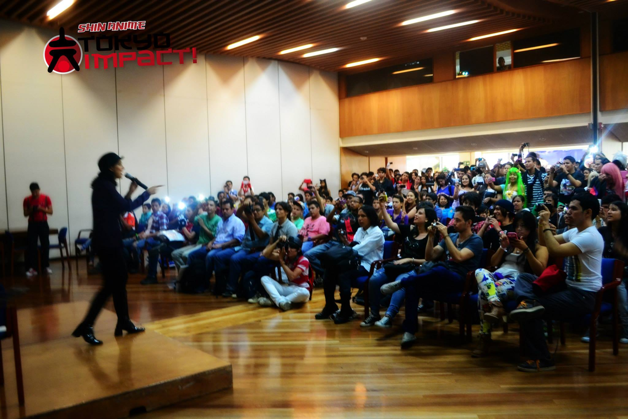 Shinanime: Tokyo Impact! foto